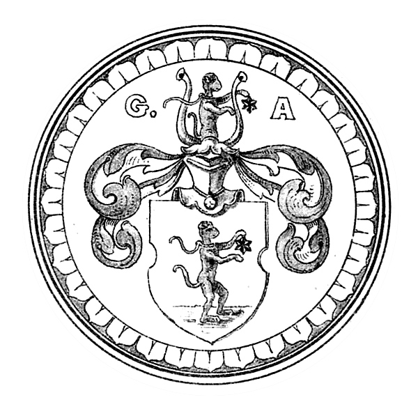 Wappen der Heilbronner Patrizier Aff